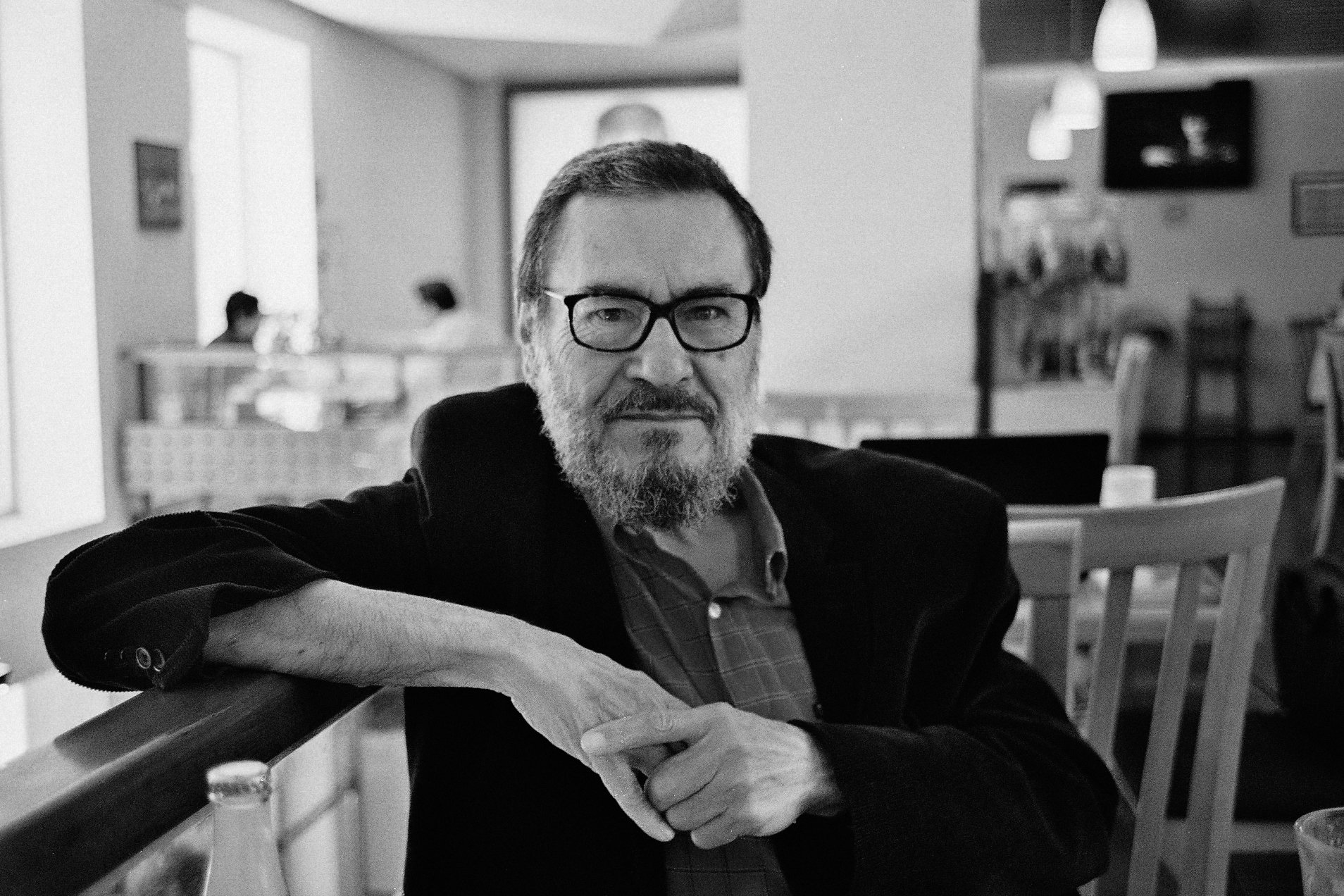 José Vicente Anaya, 2018. Fotografía de Alejandro Arras.